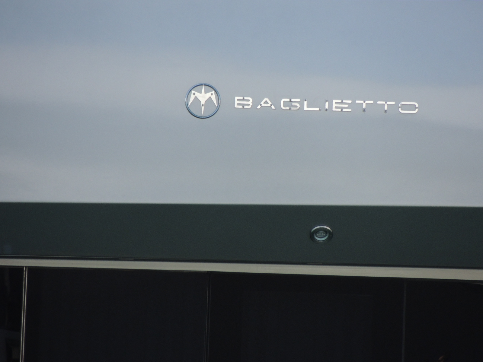 Baglietto